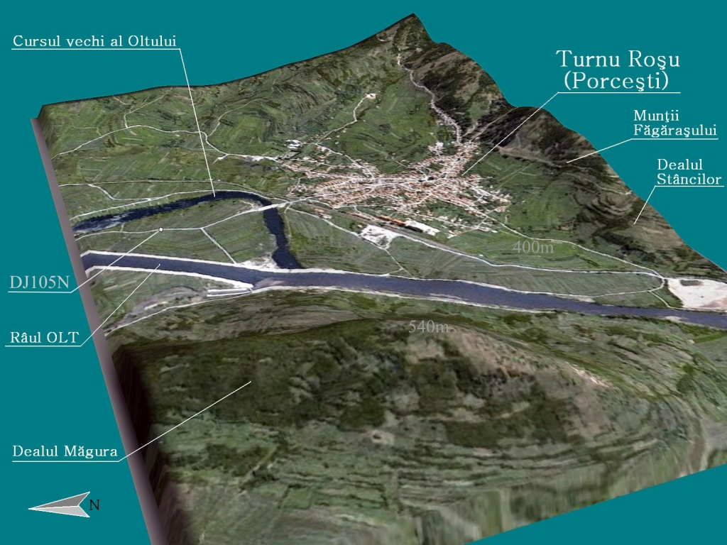 Prelucrare 3D pentru localitatea Turnu Rosu, Sibiu. Imagine realizata cu date SRTM furnizate liber de NASA.